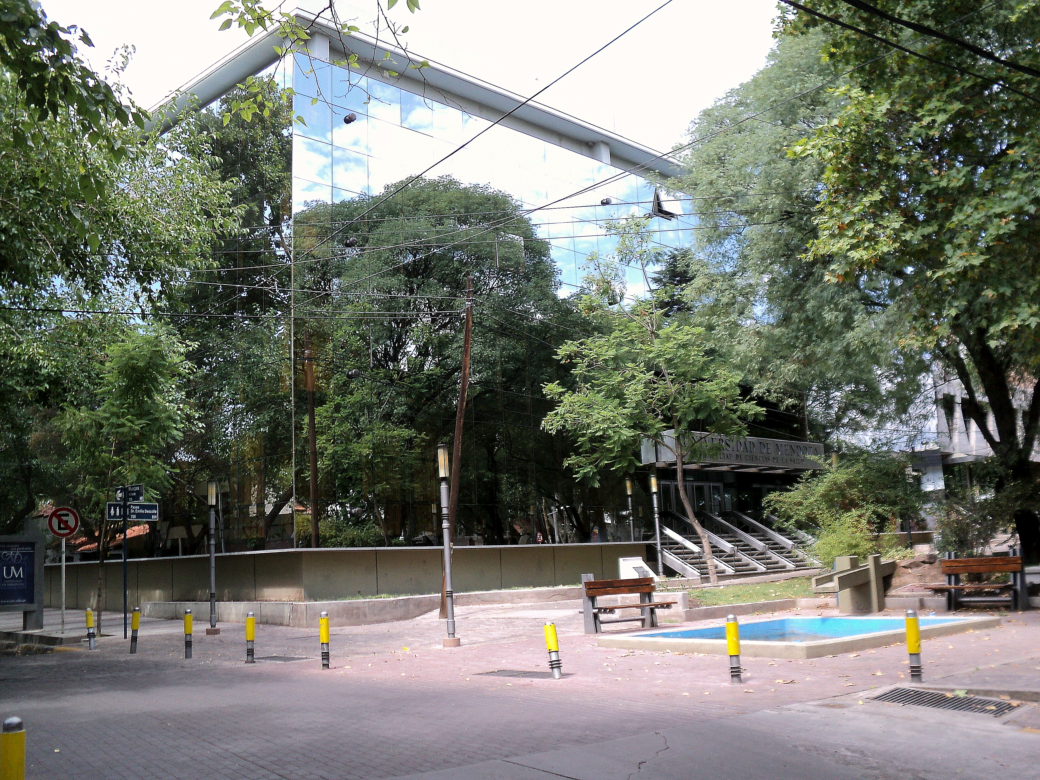 División de la Facultad de ciencias de la salud, Mendoza